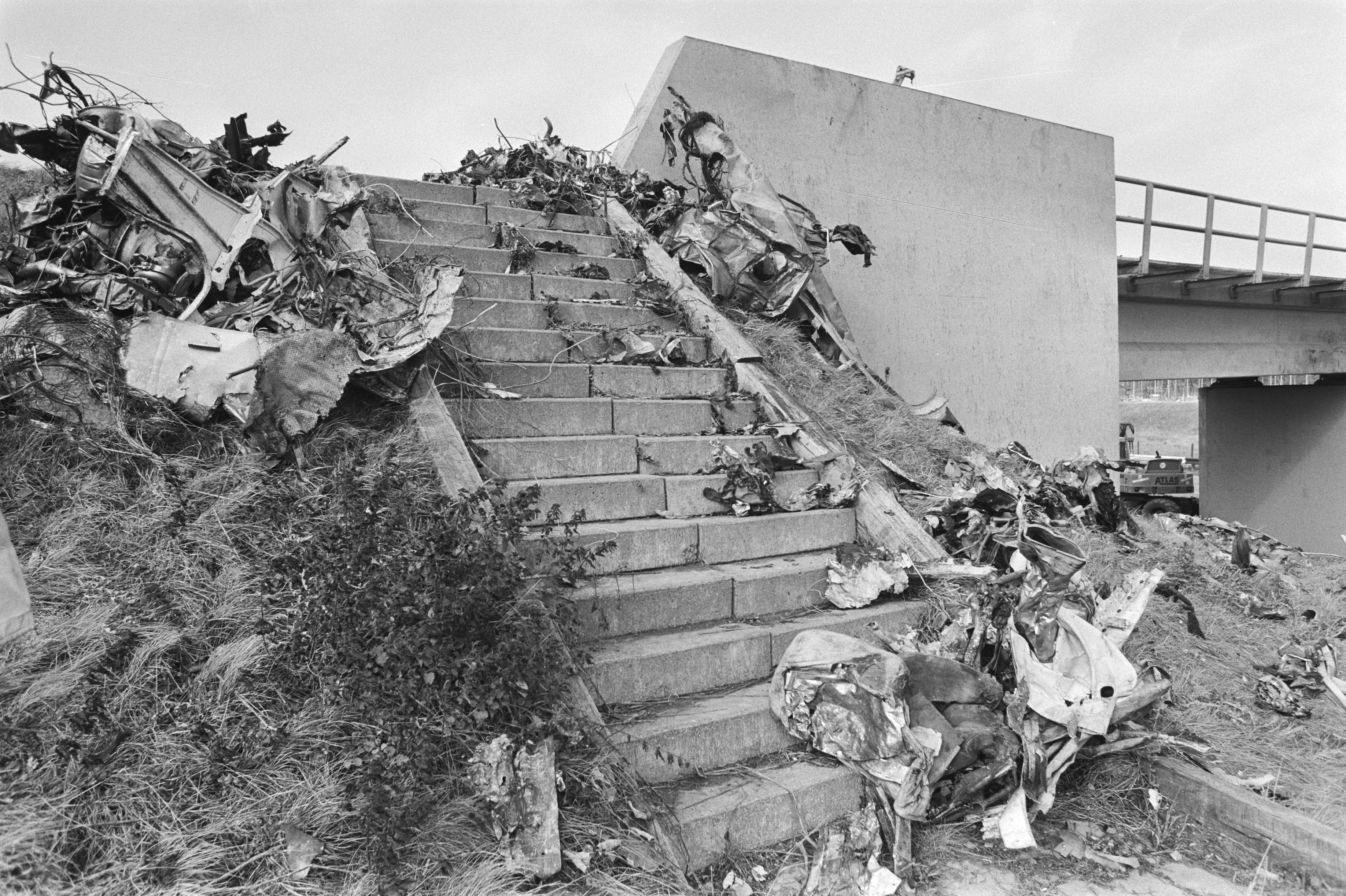 Collectie / Archief : Fotocollectie Anefo Reportage / Serie : Berging na vliegramp Moerdijk Beschrijving : De trap naar het viaduct waarnaast het vliegtuig neerkwam ligt nog vol met brokstukken Datum : 8 oktober 1981 Locatie : Moerdijk, Noord-Brabant Trefwoorden : berging, rampen, vliegtuigen Fotograaf : Croes, Rob C. / Anefo Auteursrechthebbende : Nationaal Archief Materiaalsoort : Negatief (zwart/wit) Nummer archiefinventaris : bekijk toegang 2.24.01.05 Bestanddeelnummer : 931-7303